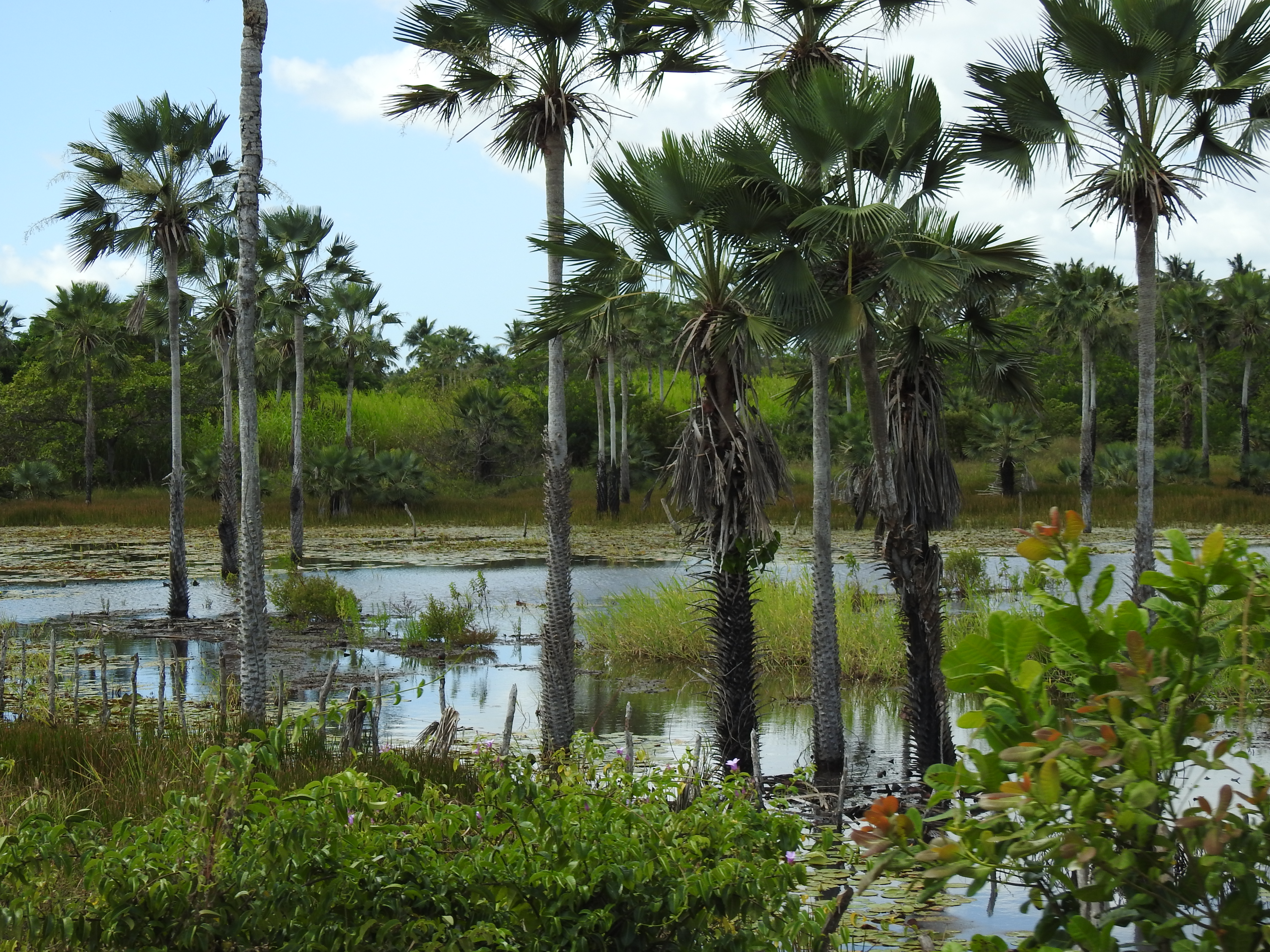 Foto tirada no município de Amontada CE a beira da CE 176